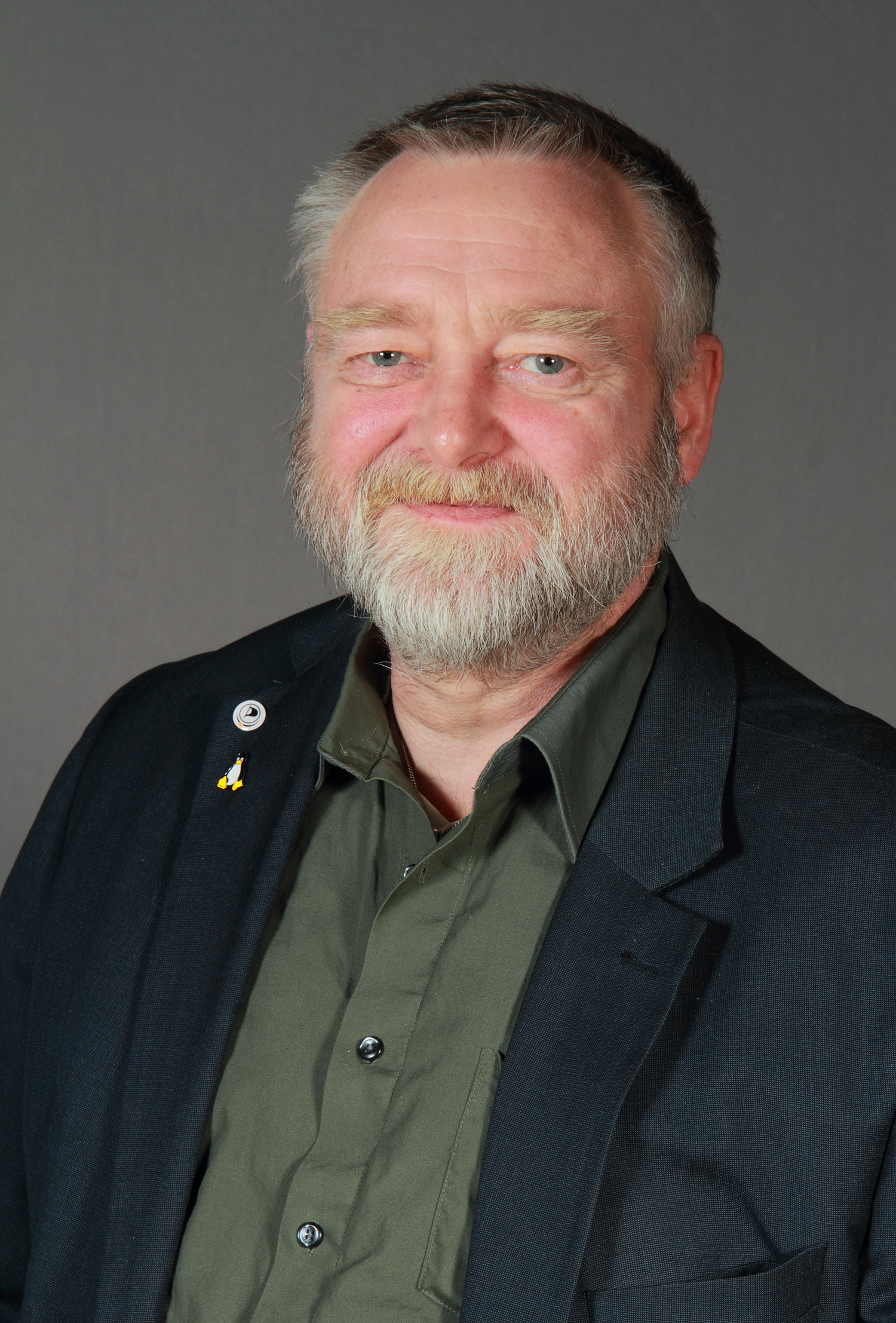 LandtagsabgeordneteR NRW